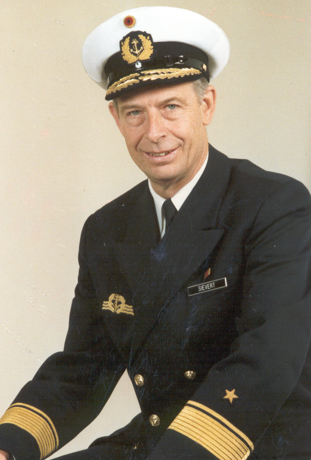 Porträtfotografie von Flottillenadmiral Klaus-Dieter Sievert